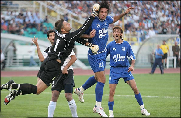 دیداری که در آن تيم فوتبال استقلال تهران در اولين هفته پنجمين دوره رقابتهاي ليگ برتر موفق شد تيم صباباتري را در ورزشگاه آزادي تهران با نتيجه 4 بر1 شكست دهد. (گزارش)